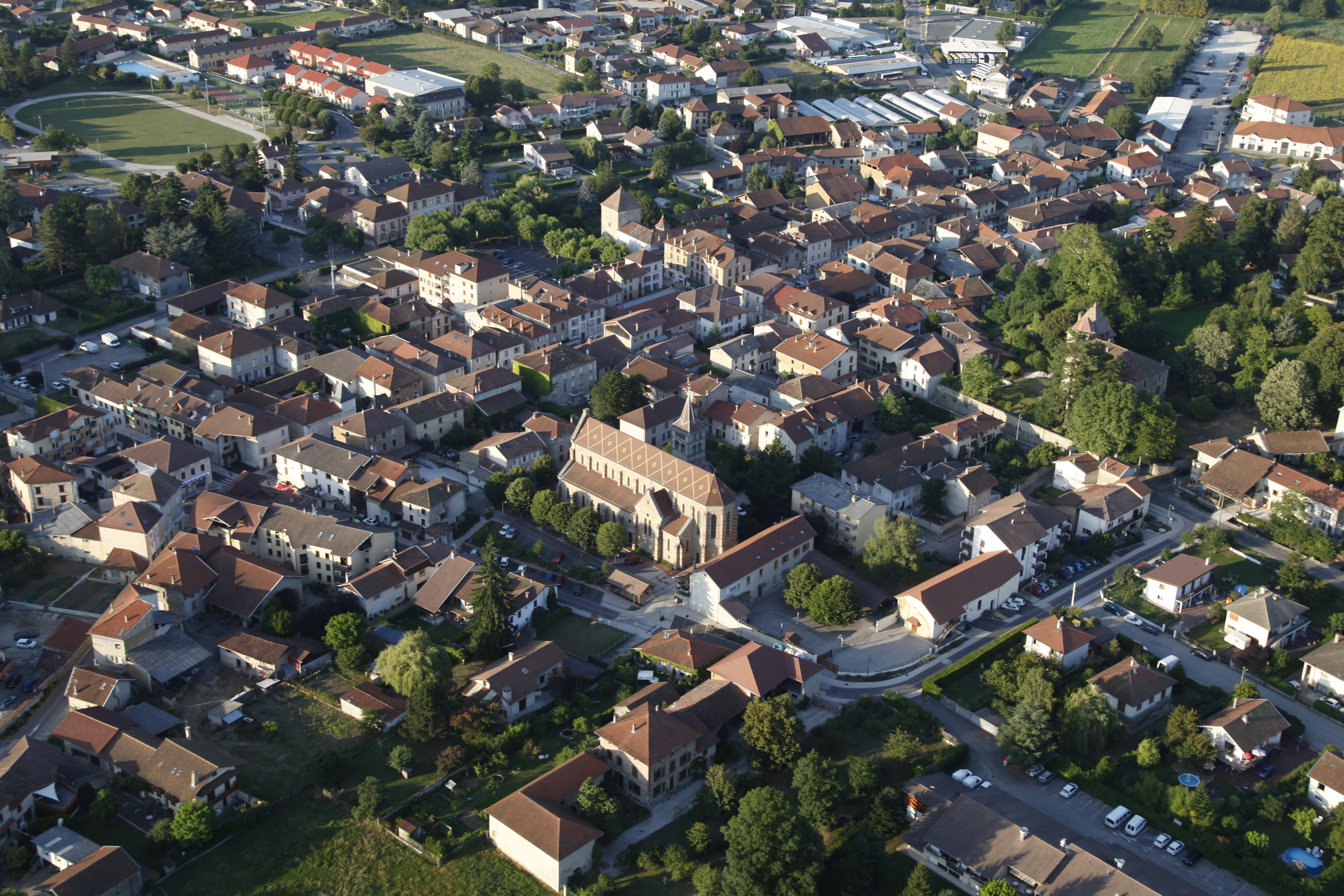 Vue aérienne du centre-ville